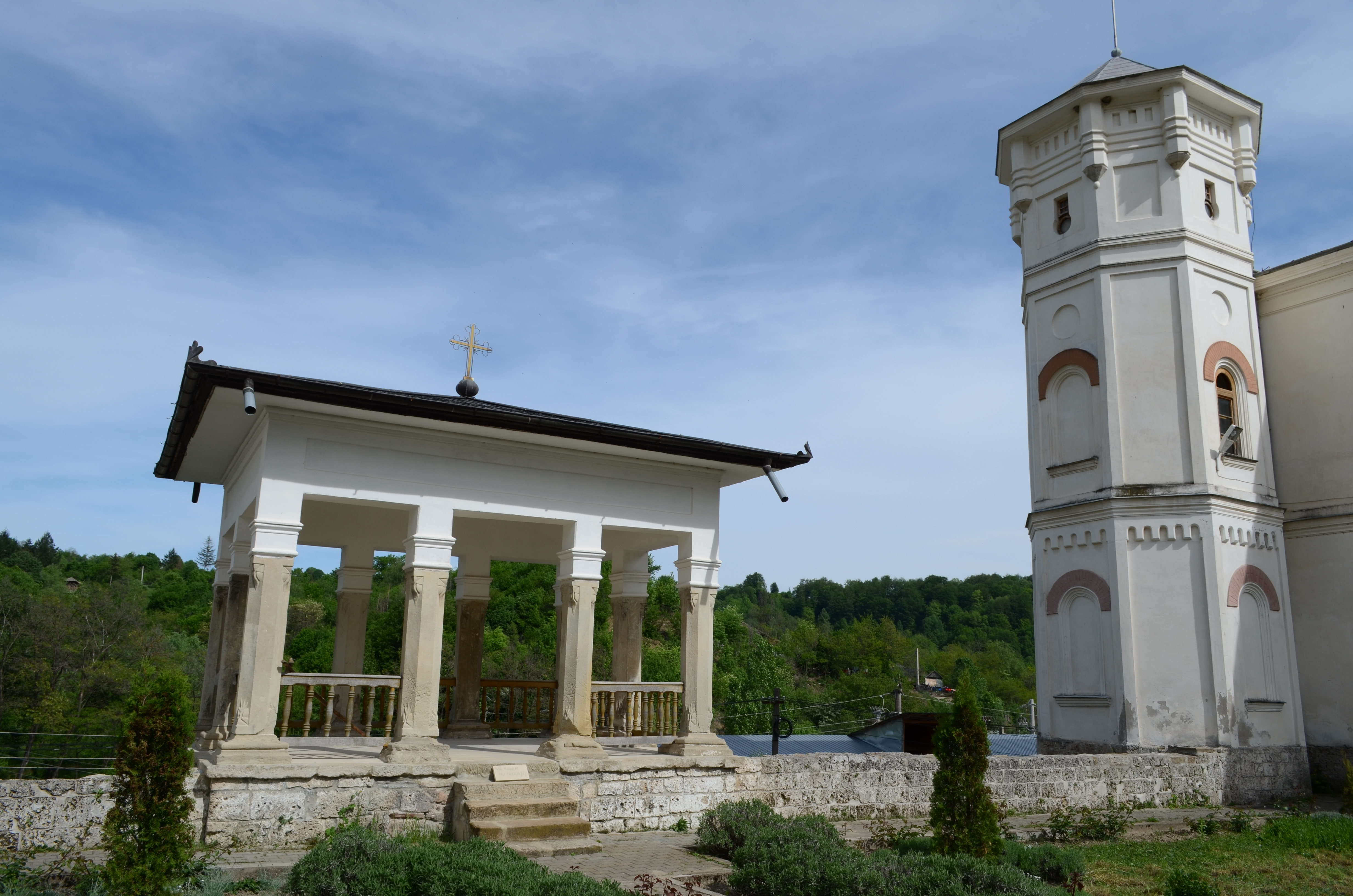 Foișorul de pe latura estică, Mănăstirea Bistrița, județul Vâlcea 05